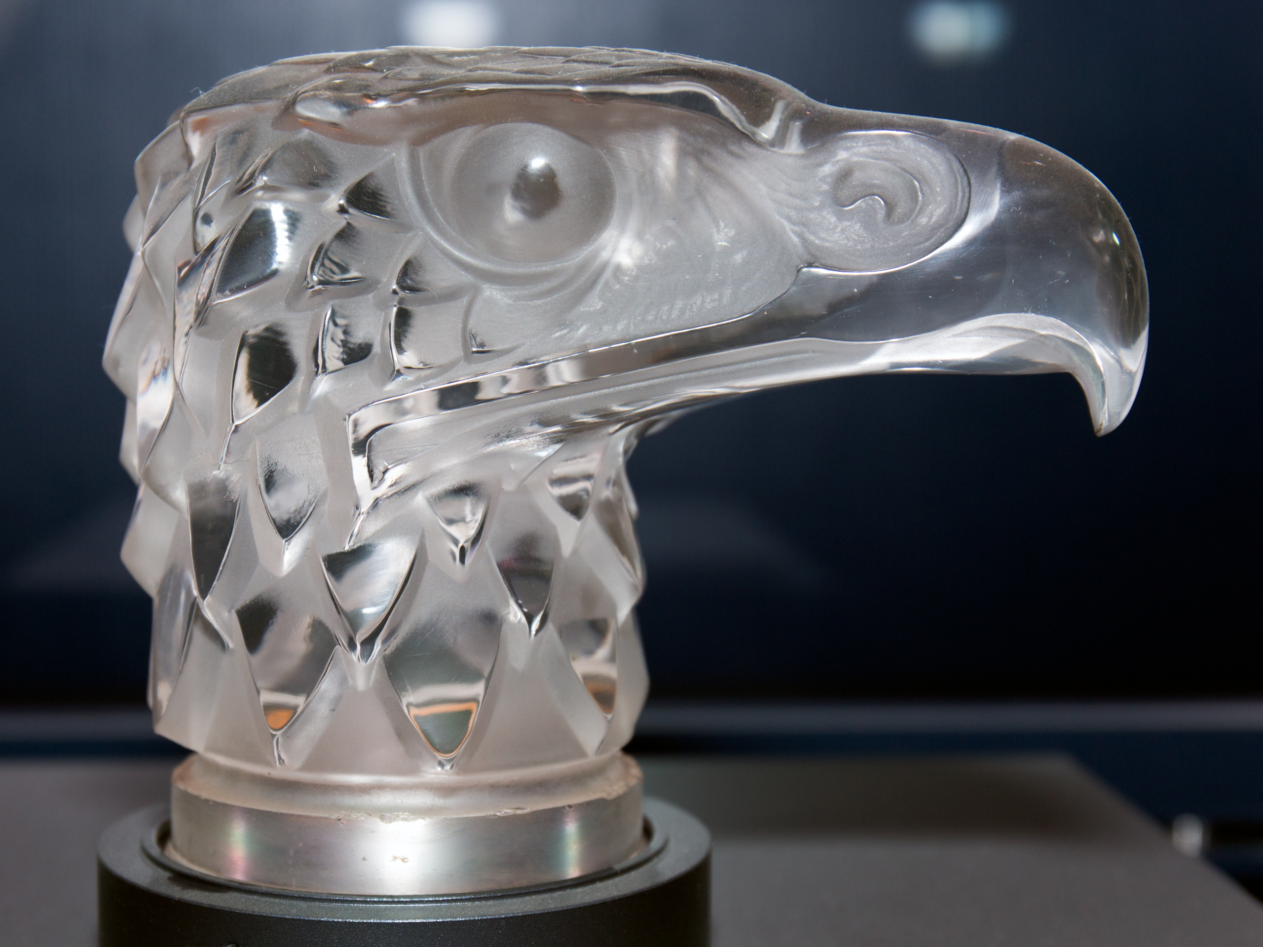 Tete D'Aigle (1928)